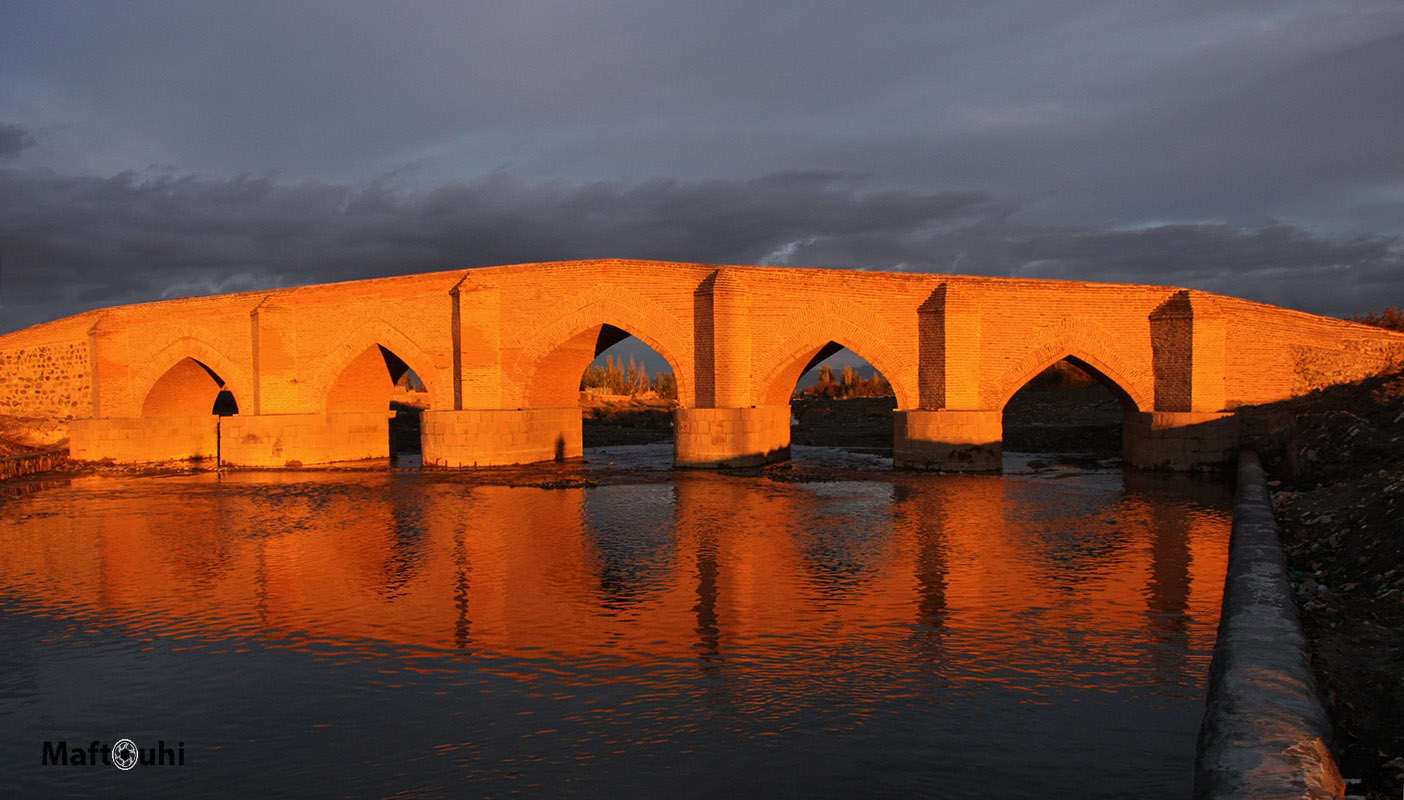 پل پنج چشمه